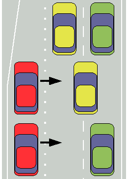 Het samenvoegen van drie tot twee rijstroken levert een ingewikkelder patroon op dan het samenvoegen van twee rijstroken tot een. Hier ontstaan in feite twee ritsen: van de middelste strook gaat een op de twee voertuigen een strook naar rechts, waar om de twee voertuigen een hiaat wordt opgezocht; daarna voegen van de meest linker strook steeds twee voertuigen in een hiaat van de middelste strook. Natuurlijk zal het beeld in de werkelijkheid anders zijn, maar uiteindelijk komen de verhoudingen wel zo uit. Zouden de twee linker stroken 'normaal' ritsen, dan komen op de middelste strook tweemaal zo veel voertuigen terecht als op de meest rechter strook. Een vierde deel van de voertuigen op de middelste strook zal dan uiteindelijk de (snellere) rechter strook kiezen.